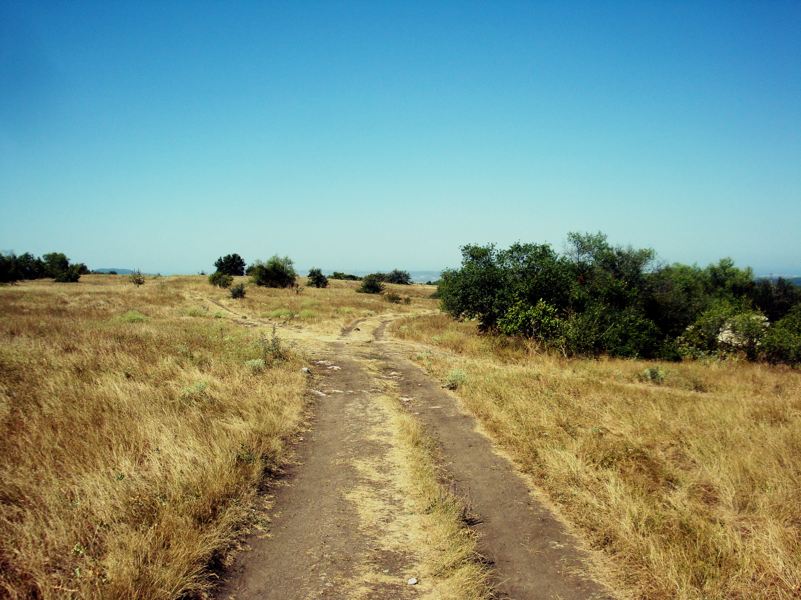 Гора останец «Мангуп-Кале», Бахчисарайській р-н, с. Залісне